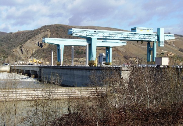 Barrage hydroélectrique de Vaugris